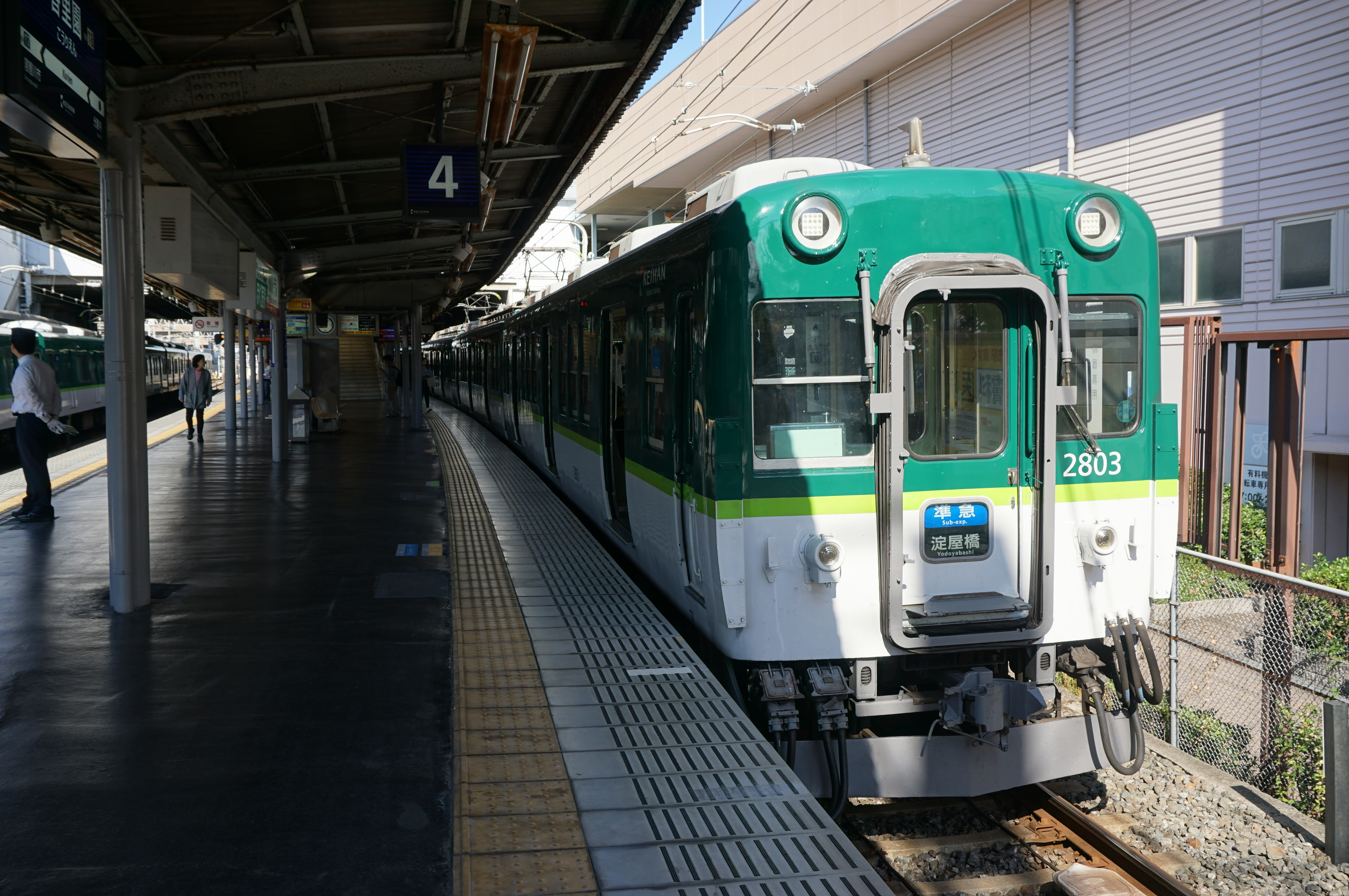 前面に転落防止幌の痕跡が残る2803号車 Sony ILCE-6000